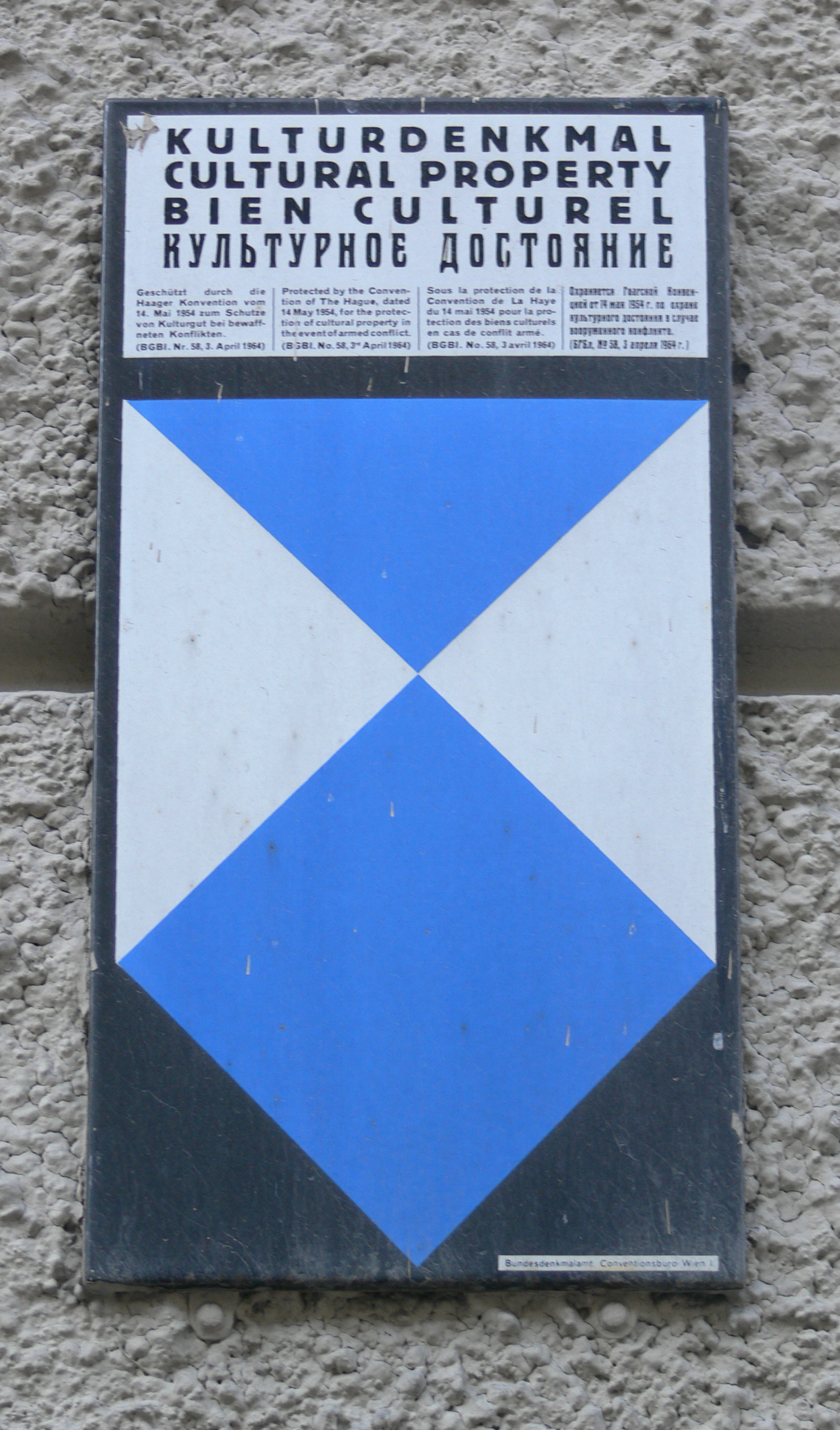 Schild "Kulturdenkmal" in vier Sprachen, photographiert in Salzburg